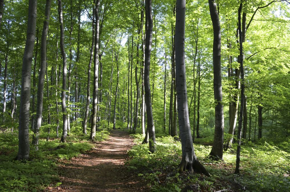 Bøkeskogen på Fokserød ligger oppe på Vestfoldraet.